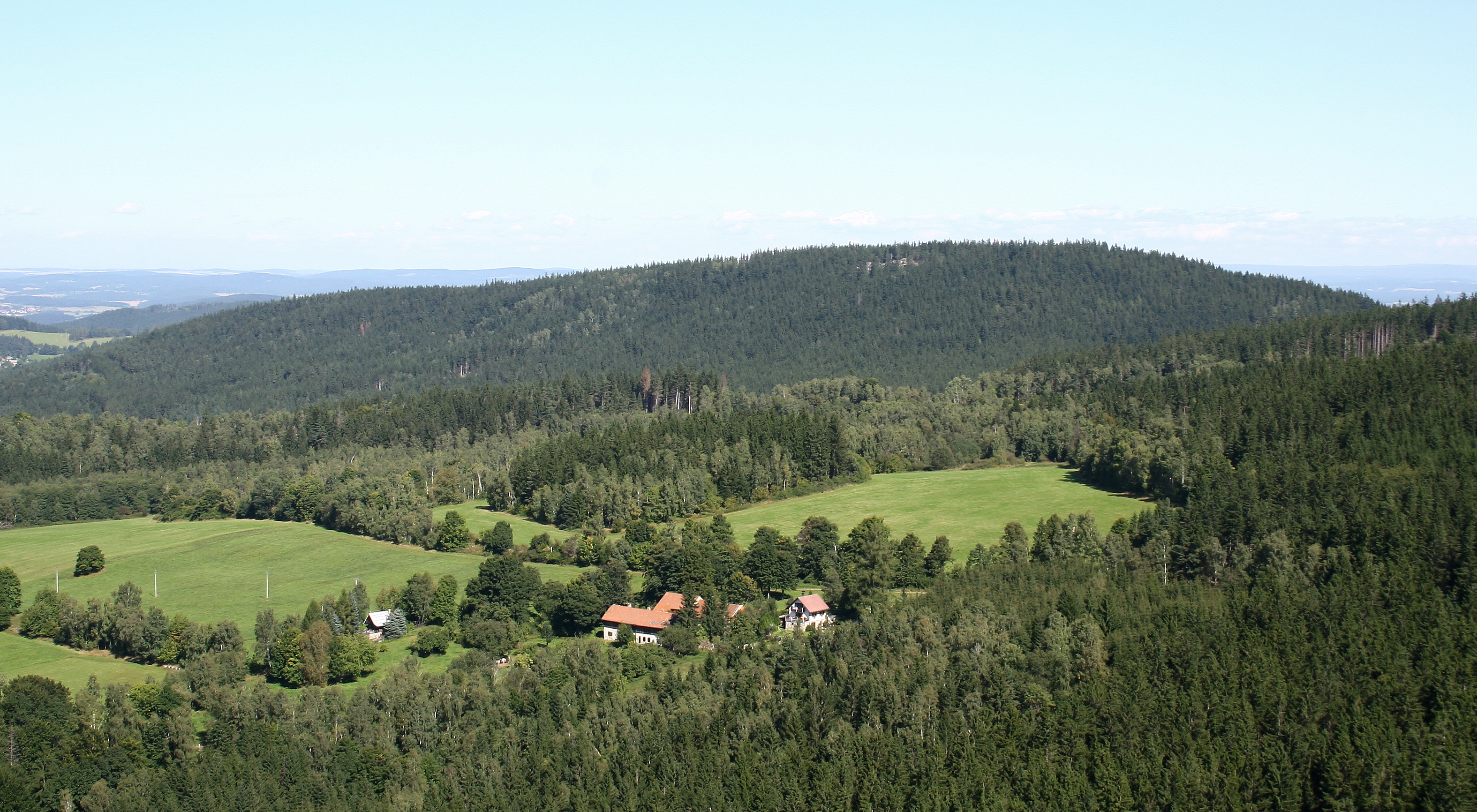 Hora Sedlo a osada Nový Dvůr při pohledu z jihu z hradu Kašperku. Okres Klatovy, Plzeňský kraj, Česká republika.